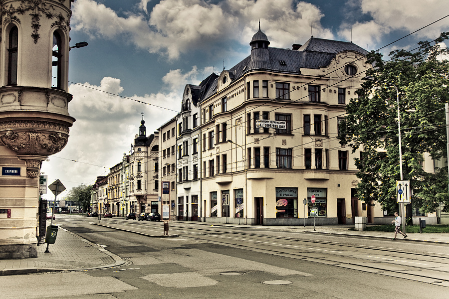 Ostrava PřívozNádražní ulice, pohled od náměstí Svatopluka Čecha západním směrem k žst. Ostrava hlavní nádraží